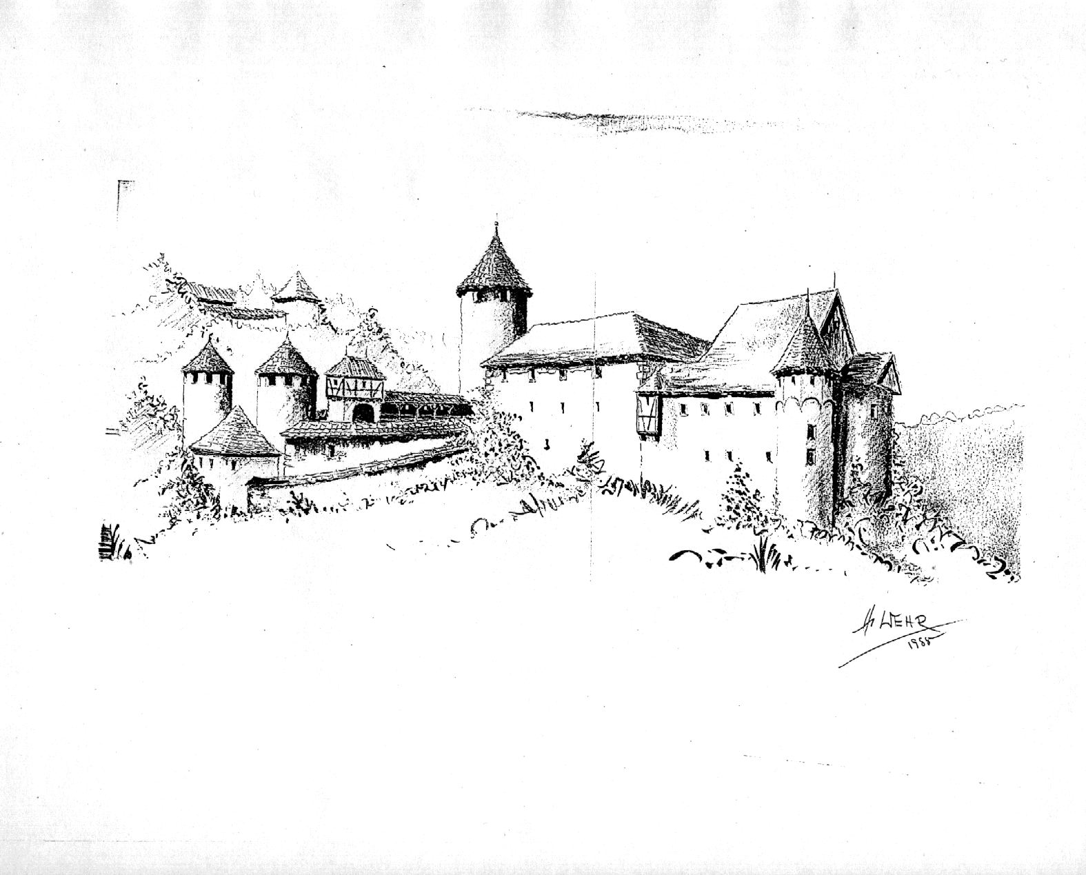 Rekonstruktionsversuch der Burgruine Marstetten. Erstellt von Hubert Wehr.